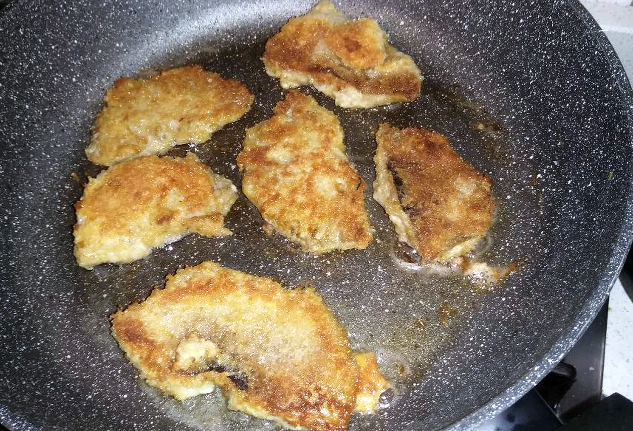 Teste di mazze di tamburo o cucumele (Macrolepiota procera) tagliate a metà e impanate in fase di frittura